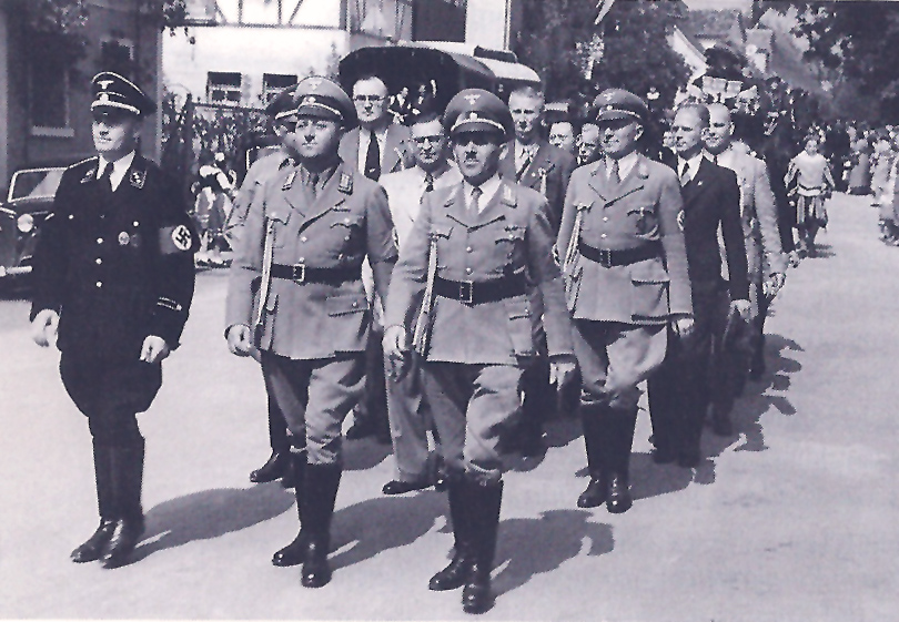 Markgröninger Nazi-Führer um Ortsgruppenleiter Wilhelm Schmückle im Festzug des Schäferlaufs